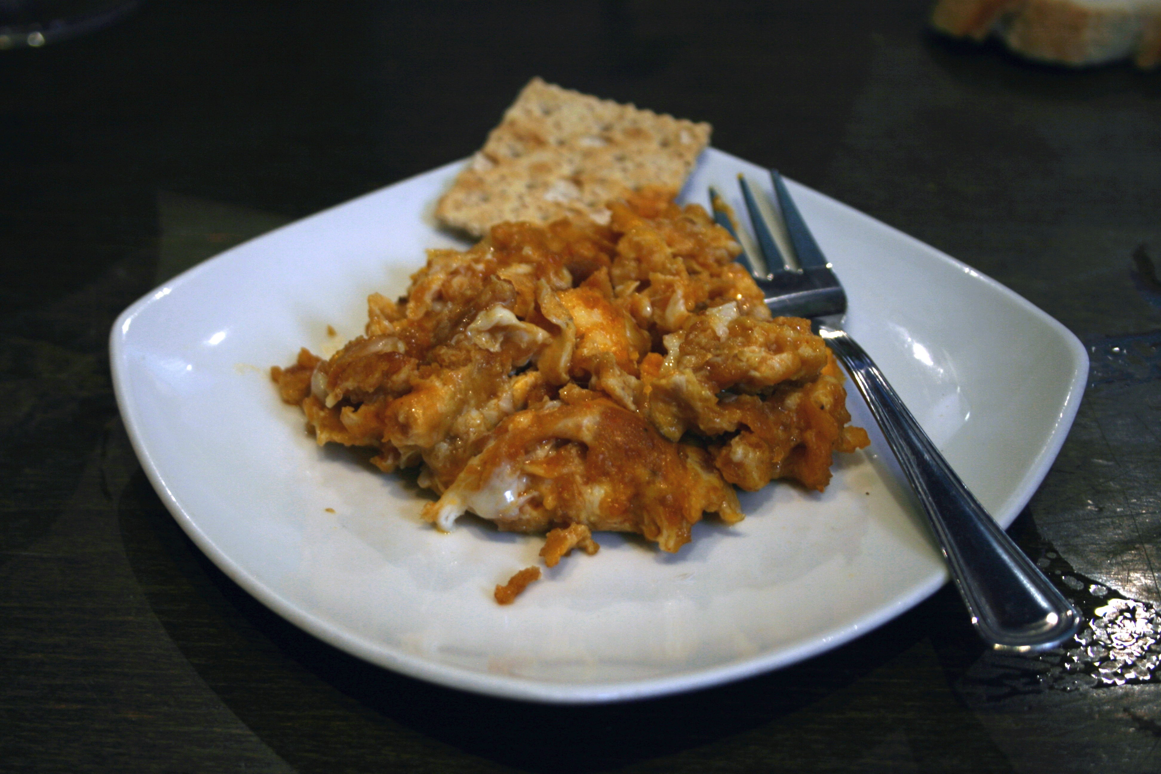 Revuelto de farinato con un cracker